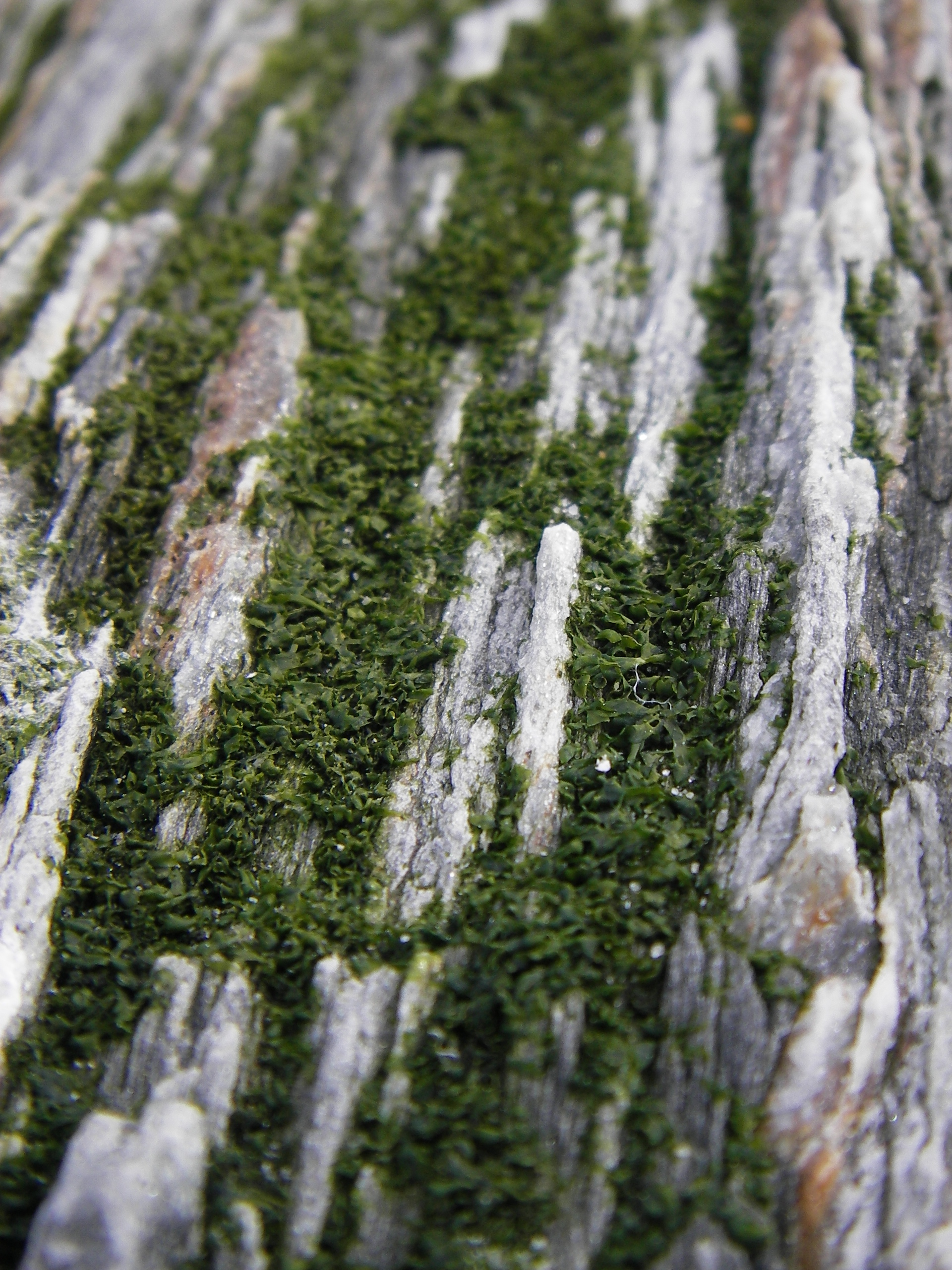 Grünalge, die in der Spritzwasserzone auf Felsen wächst, die von Seevögeln frequentiert werden